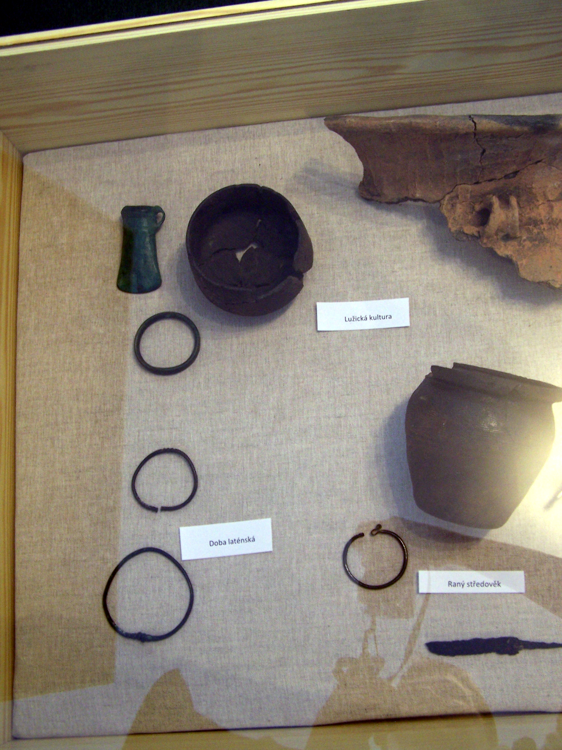 Archeologické nálezy z obce Ratenice a jejího okolí